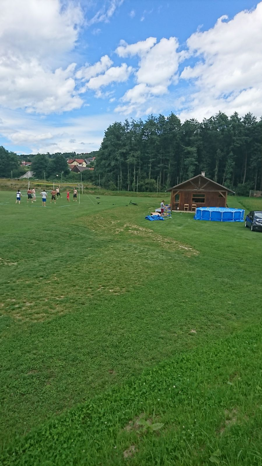 Sommer 2017